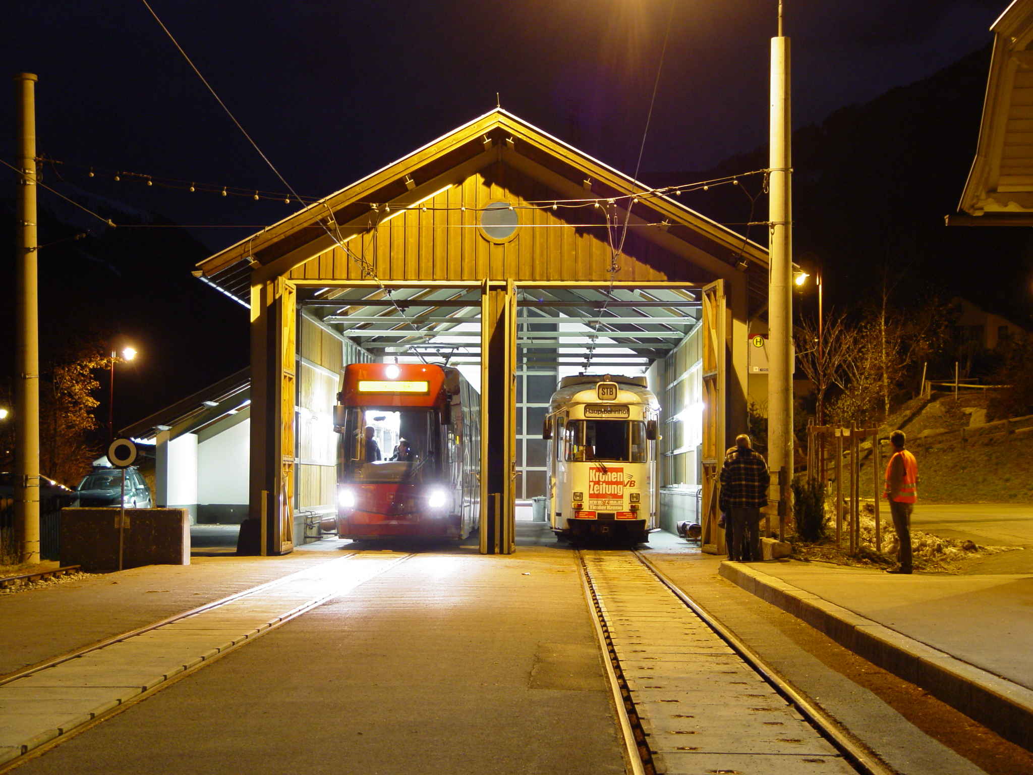 Flexity Outlook TW351 und ex-Hagener TW84 in der Remise der Stubaitalbahn in Fulpmes